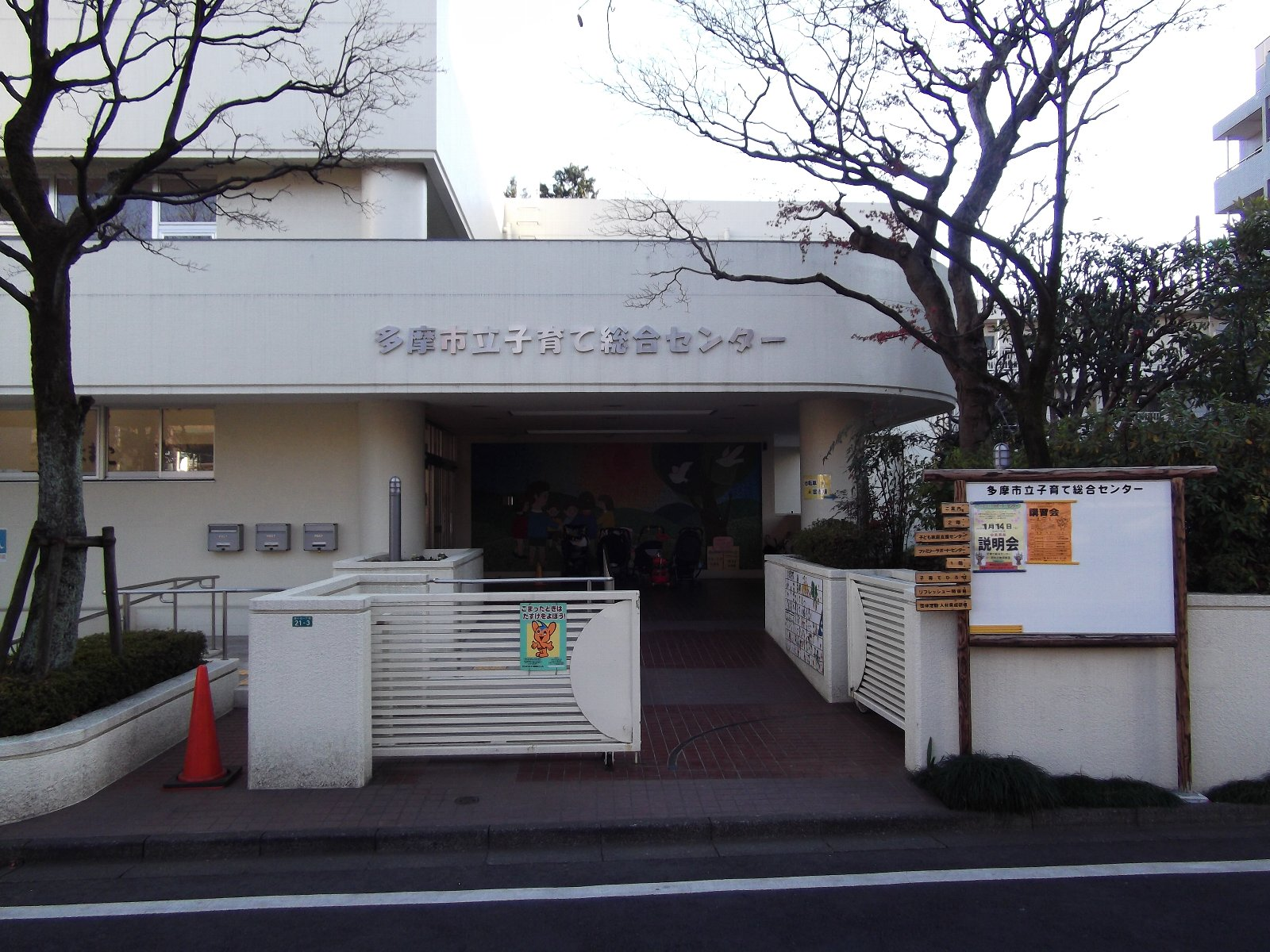 多摩市立子育て総合センター「たまっこ」